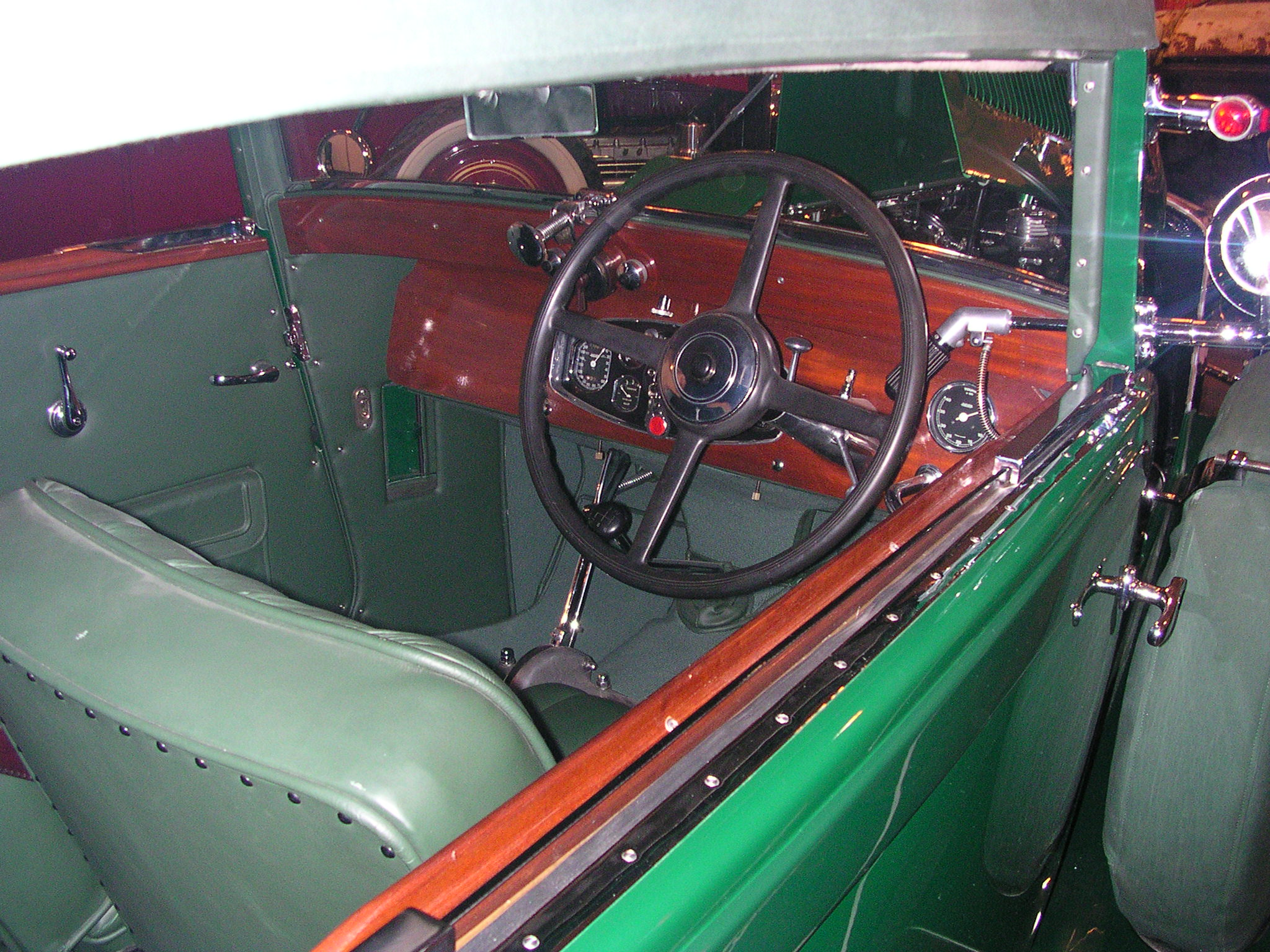 Essen, Technoclassica 2005. Tatra 80, Baujahr 1932, wassergekühlter 12-Zylinder-Motor, 5990 cm³, 88 kW (120 PS), vmax 140 km/h